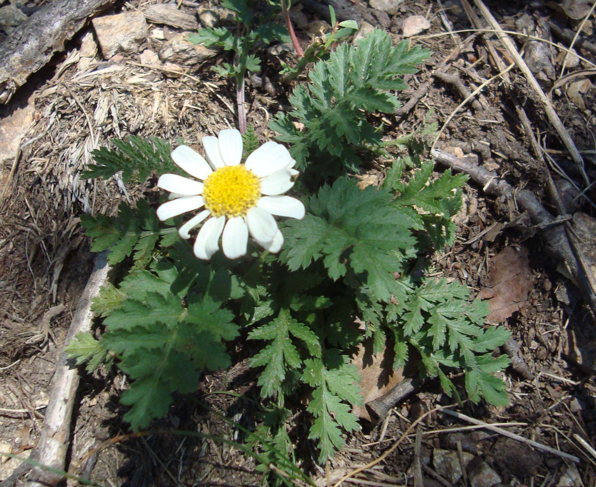 Pyrethrum corymbosum - řimbaba chocholičnatá na kopci Kalvárie v Podkomorských lesích. Netypická forma s jedním úborem.